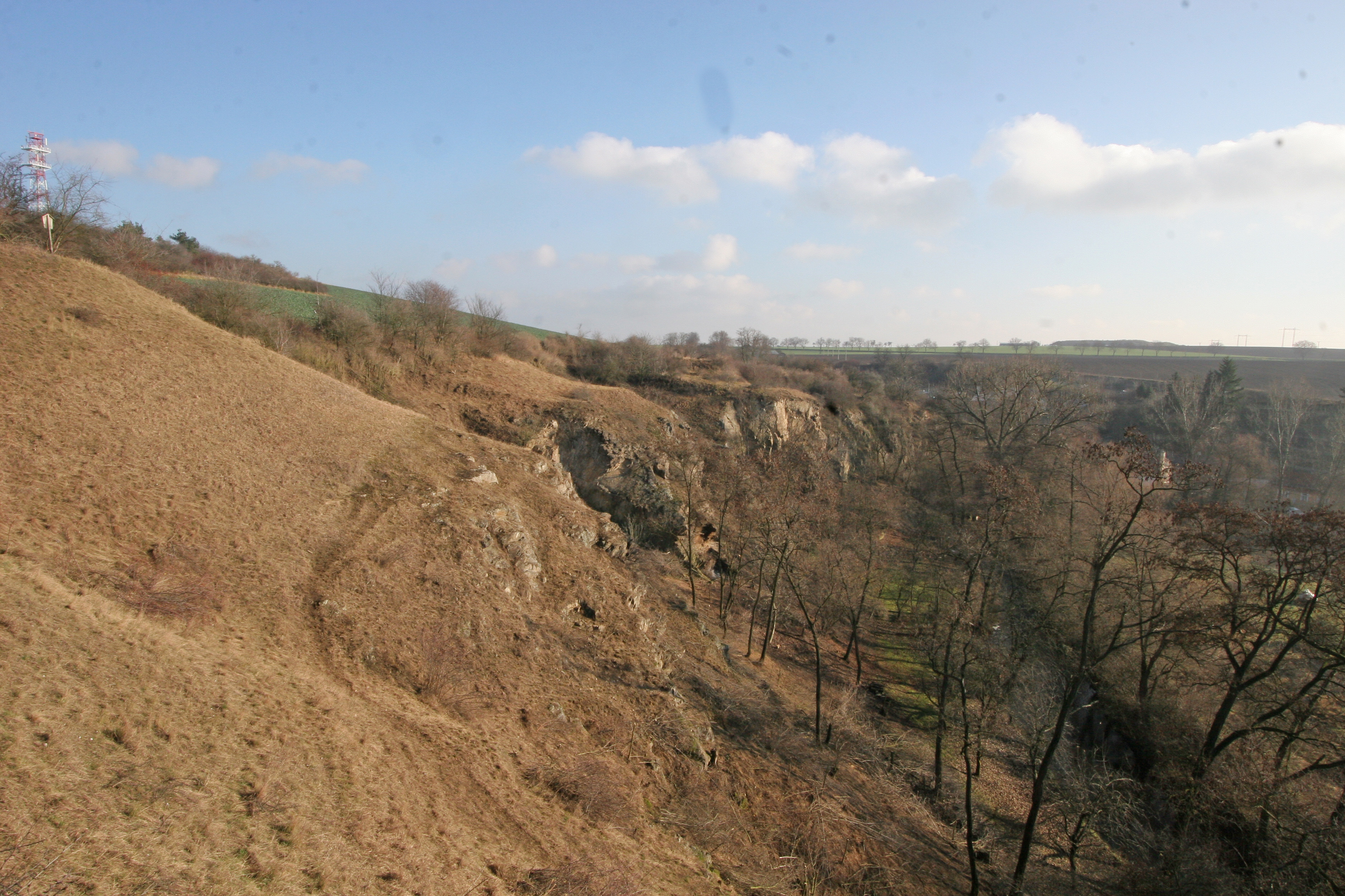 PP Stráň u Chroustova